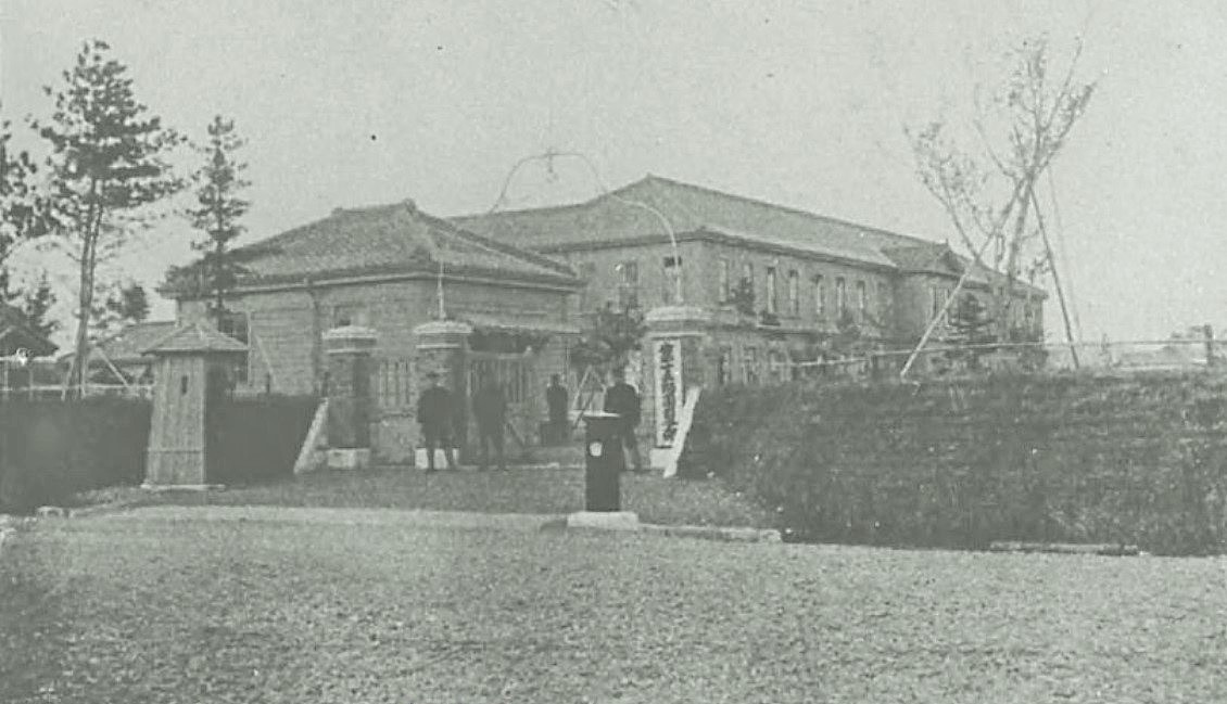 第十五師団司令部 豊橋